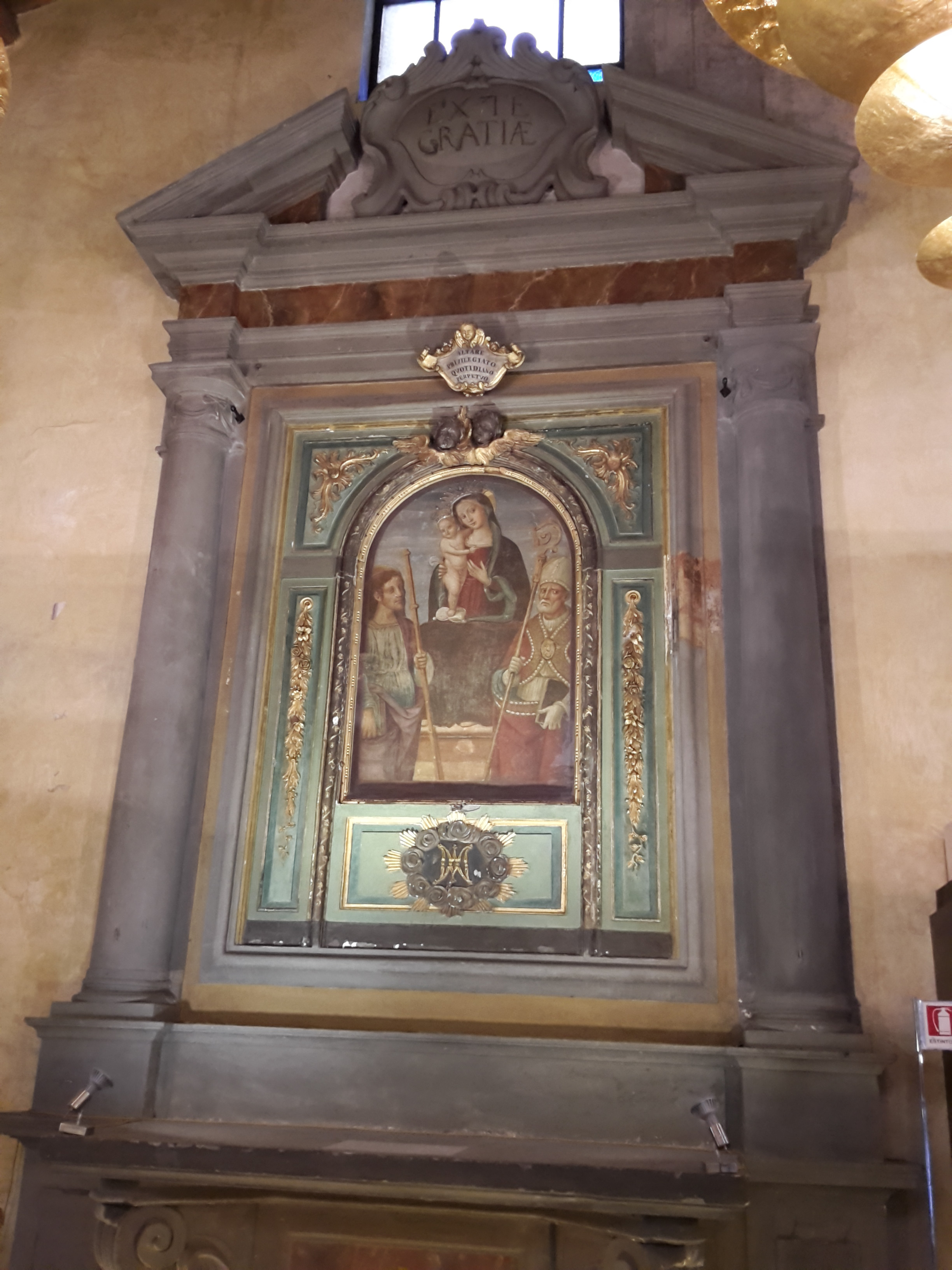 immagine miracolosa detta Madonna del Giglio. Quando la chiesa di Santa Maria Presbiteri Anselmi accolse questa immagine (che si trovava in un tabernacolo all'angolo della strada) nel 1668, la chiesa stessa mutò il nome in Chiesa di Santa Maria del Giglio. La stessa strada dove si affaccia l'ingresso attuale della chiesa si chiama appunto Via del Giglio.